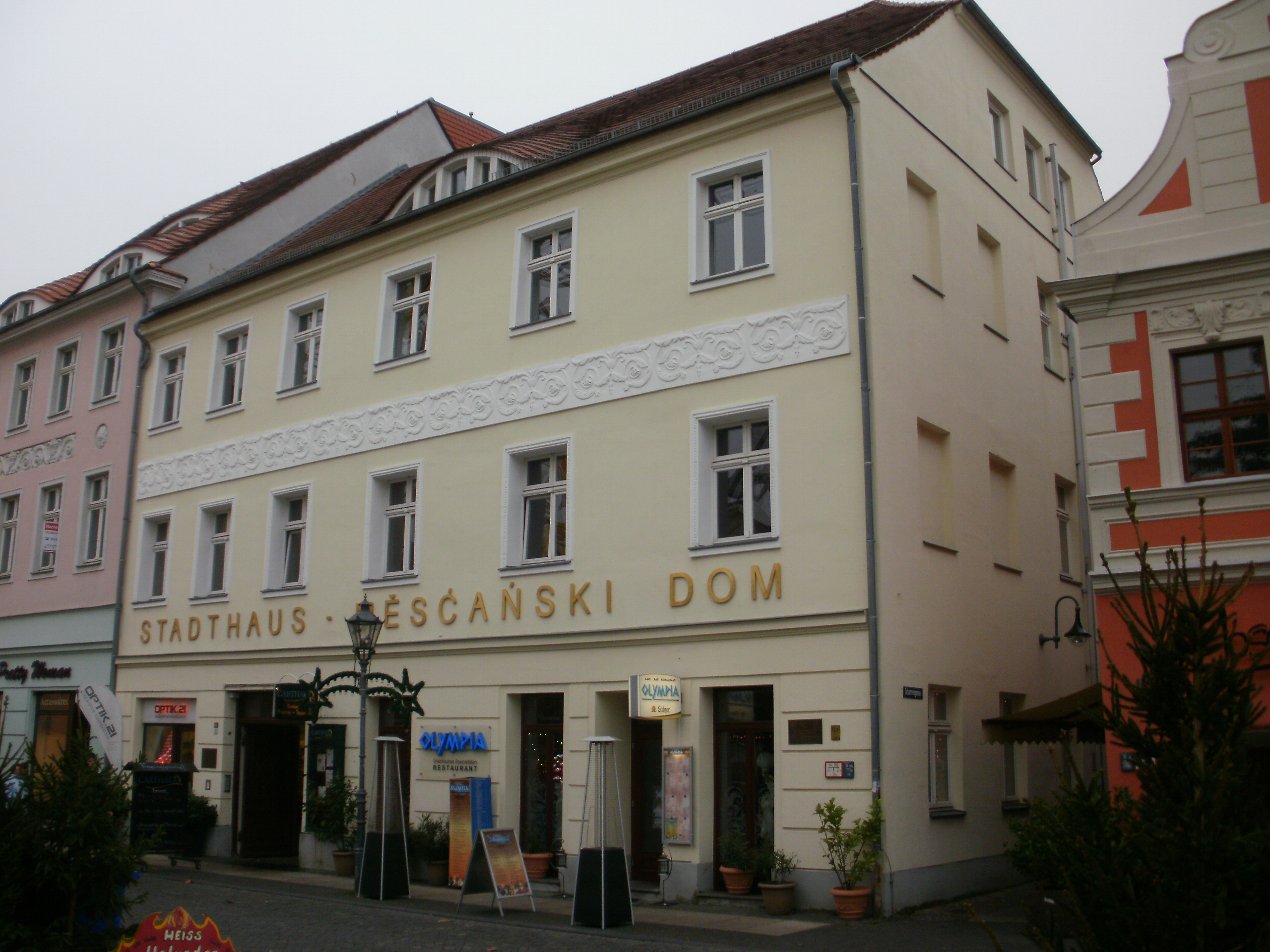 Altmarkt 21, Cottbus